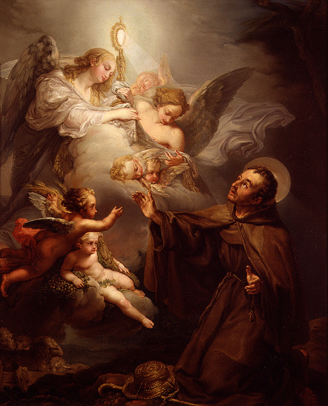 La obra representa a San Pascual Bailón adorando la Sagrada Eucaristía.